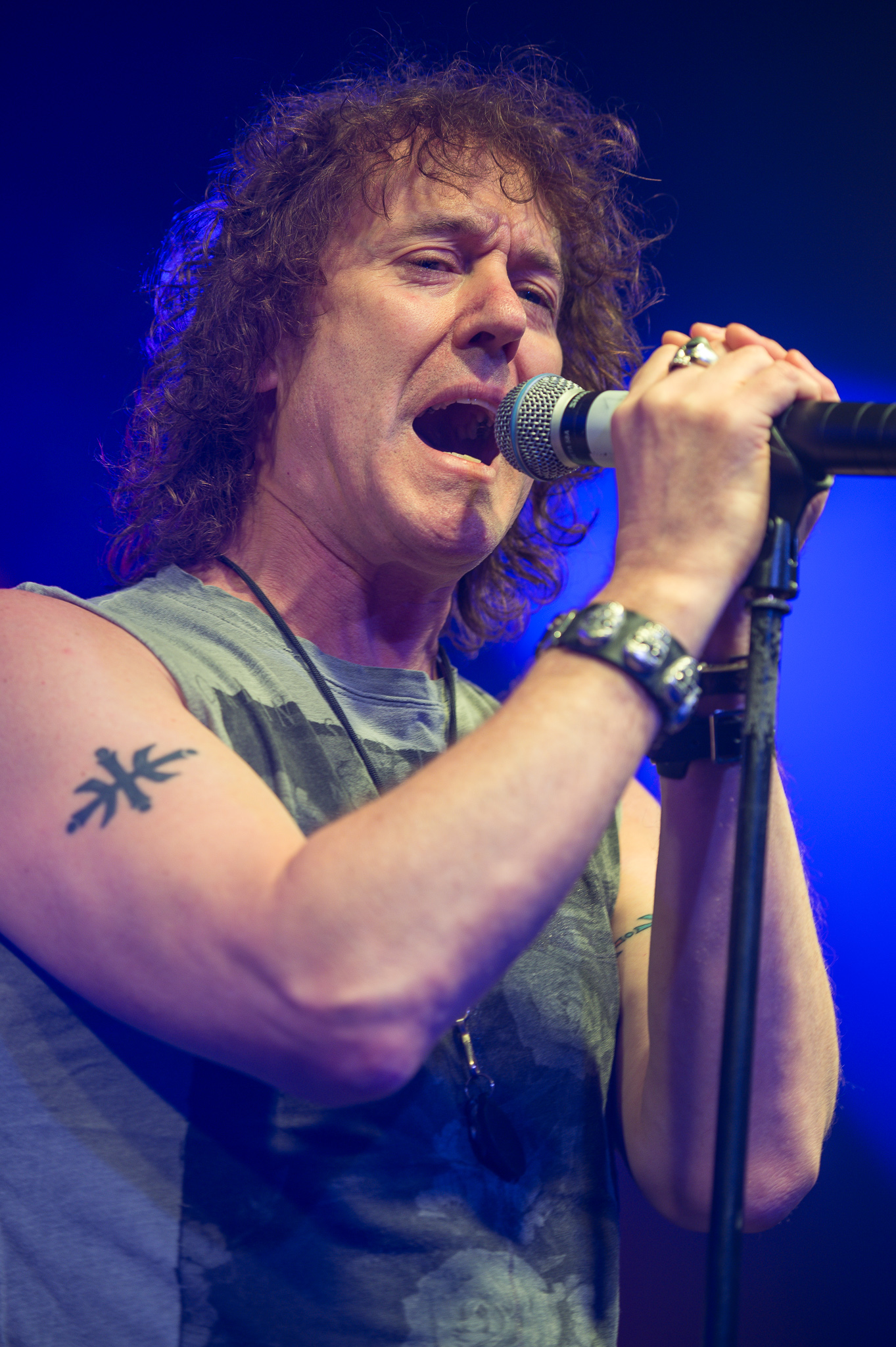 Carl Sentance,Concertbüro Franken,Der Hirsch,Konzert,Livekonzert,Livemusik,Musik,Nazareth